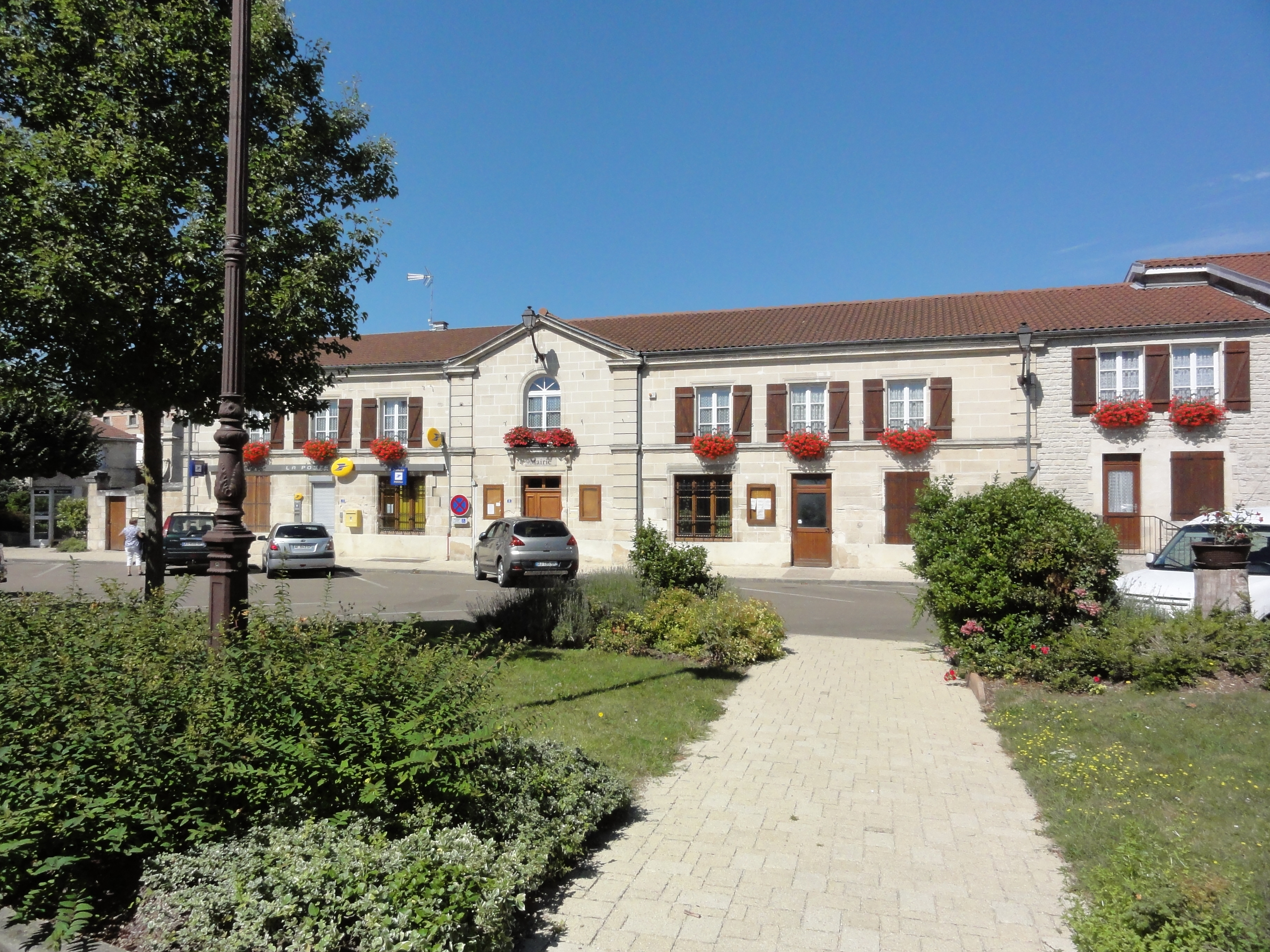 Chamouilley (Haute-Marne) mairie